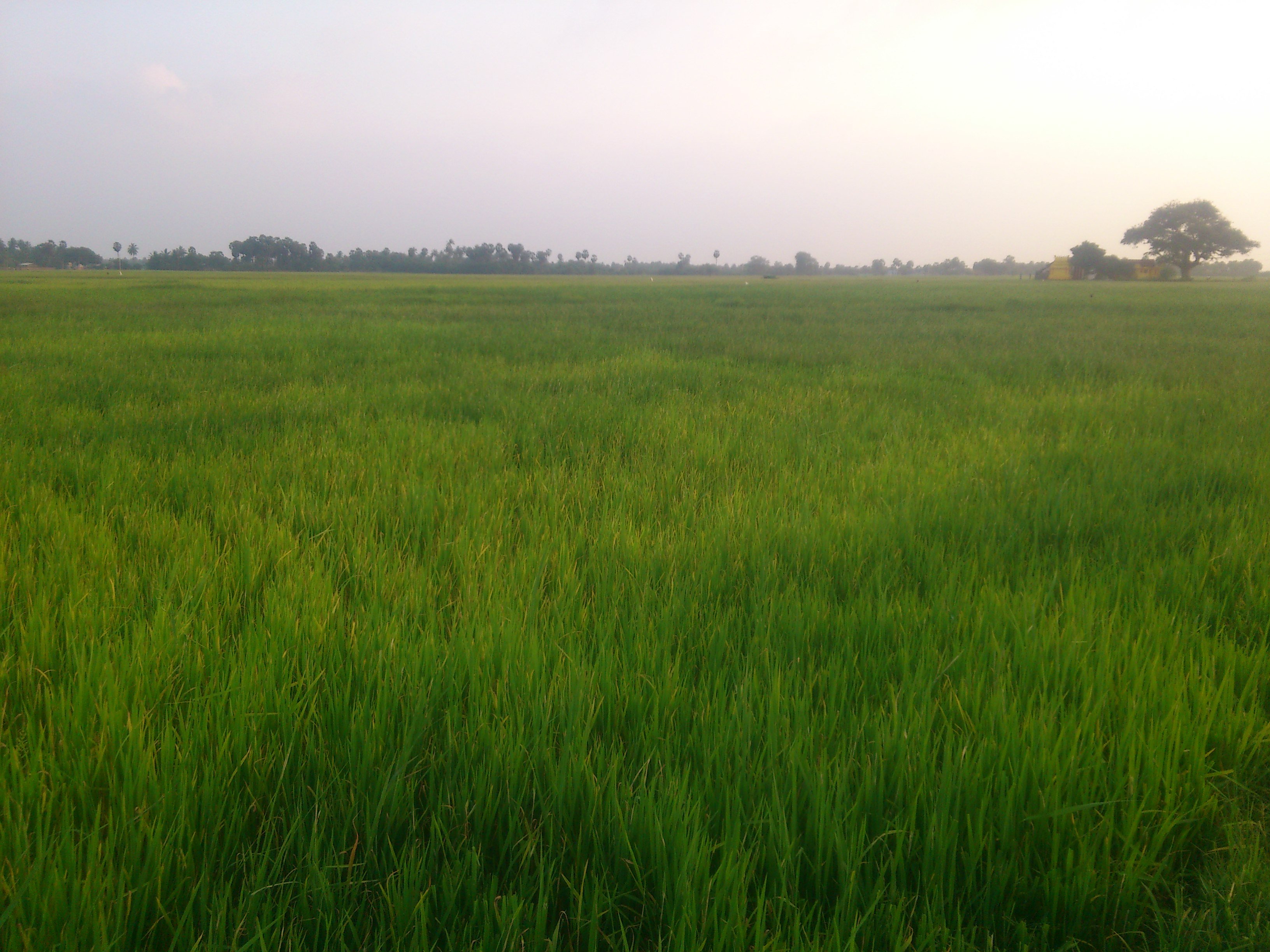 நெணியன் வயல்வெளி